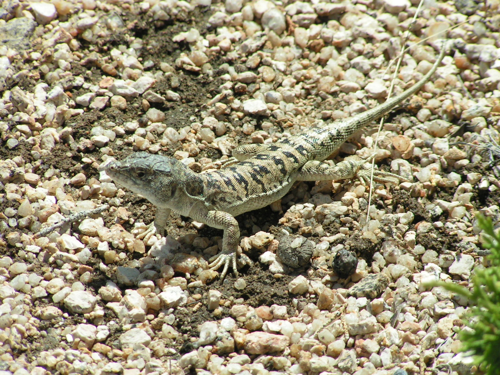 Разноцветная ящурка (Eremias arguta). Балхаш. Казахский мелкосопочник.